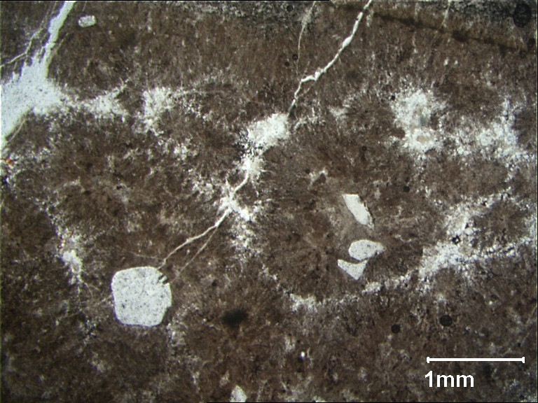 Sphérolites feldspathiques dans une rhyolite fluidale de l’Esterel. Noter la structure fibro-radiée des sphérolites. Photo Gilbert Crevola.